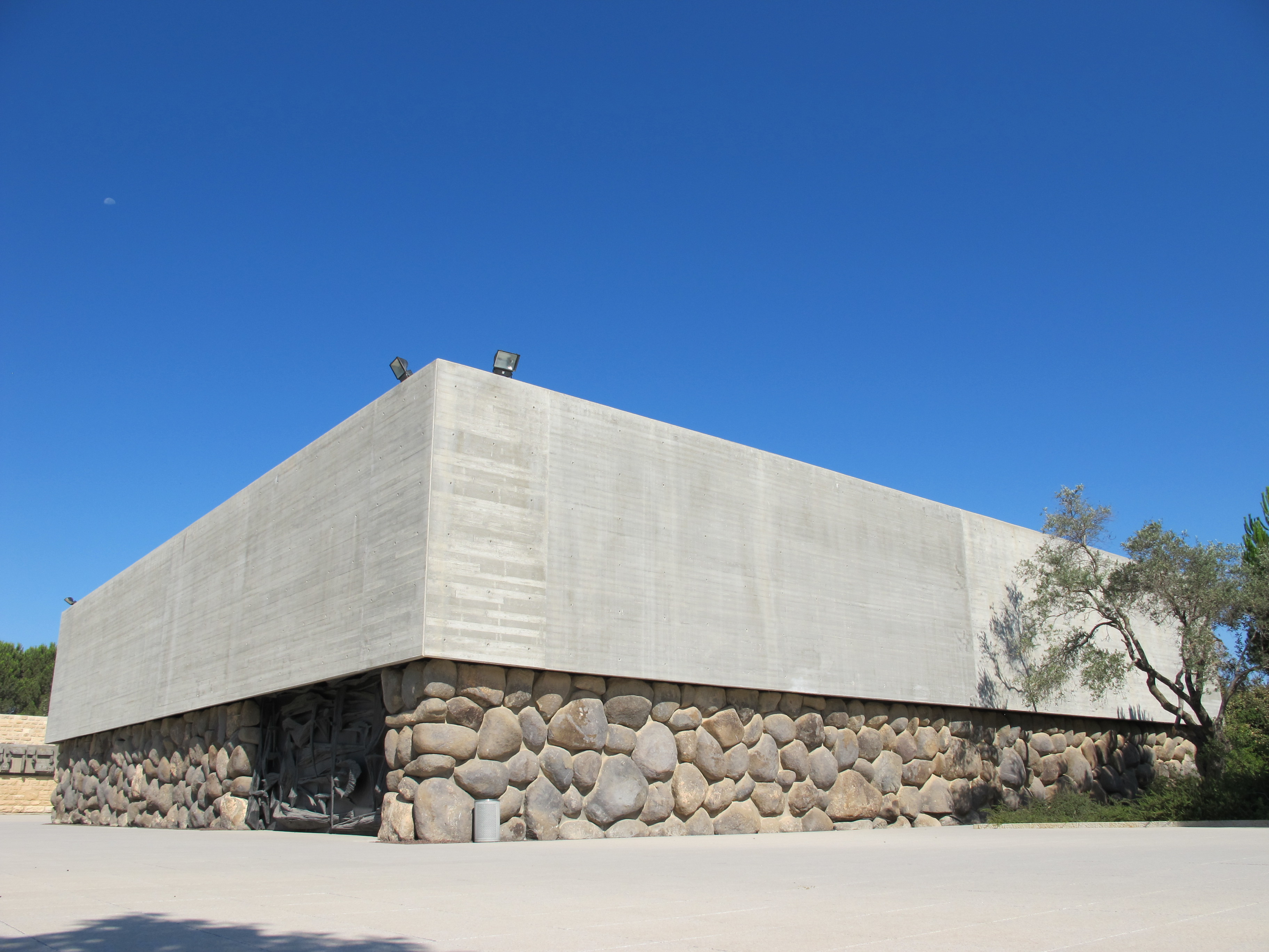 אוהל יזכור באתר יד ושם בתכנון אריה אלחנני, אריה שרון ובנימין אידלסון